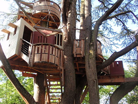 Puumaja Château de Langeais pargis Loire Valley-s